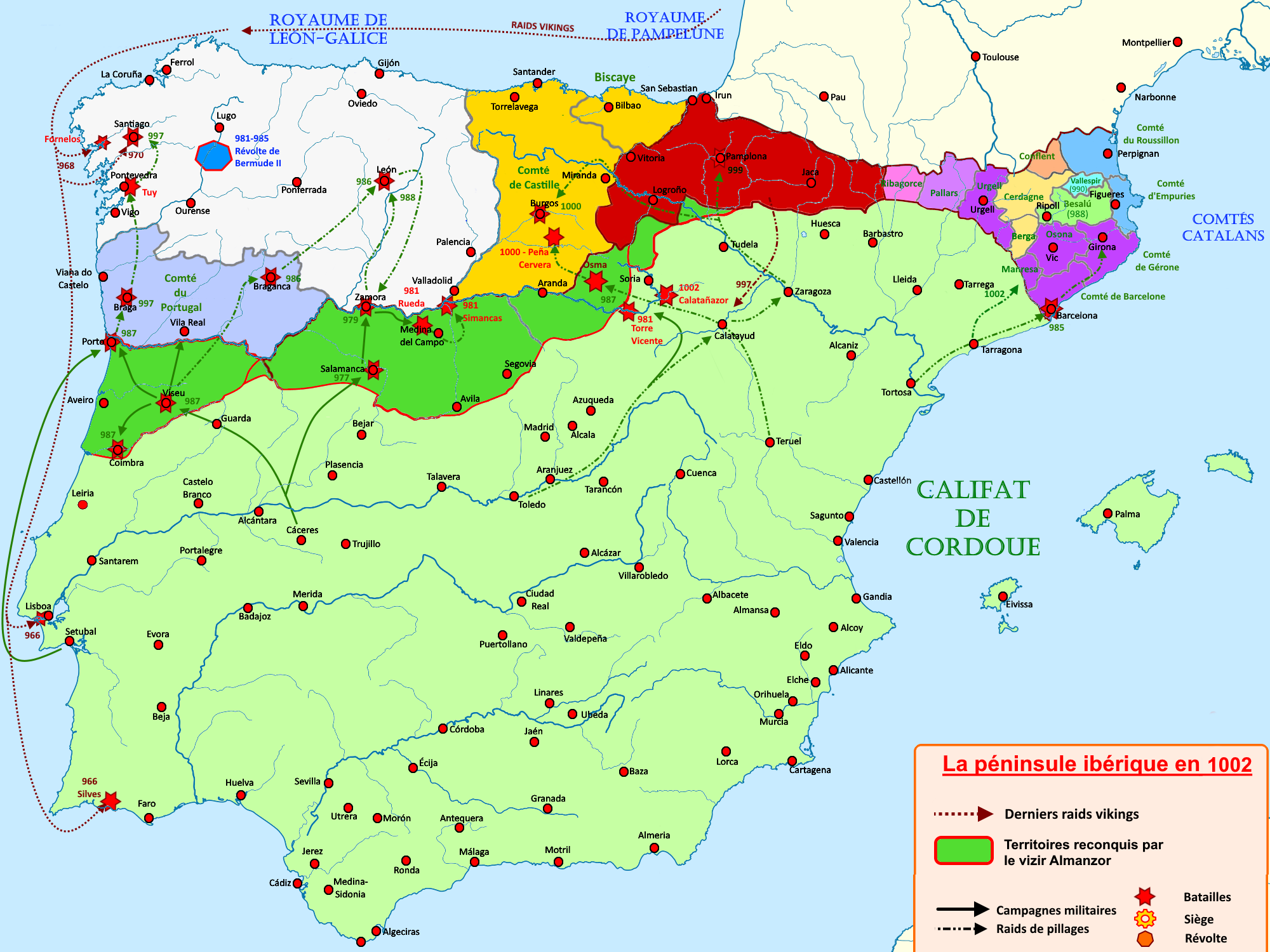 Carte de la péninsule ibérique de 961 à 1002, montrant les conquêtes et raids d'Almanzor.